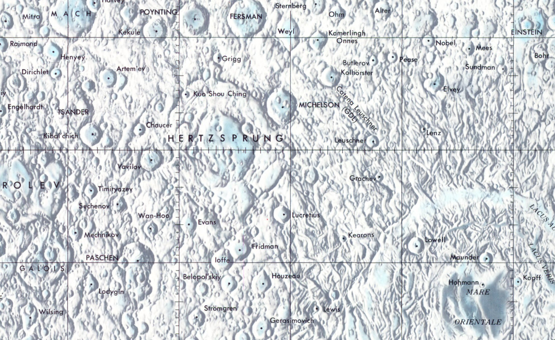 Detalle de la imagen Moonmap from Moon Map - Equatorial region 45S to 45N - LPC1 - NASA del cráter Hertzsprung